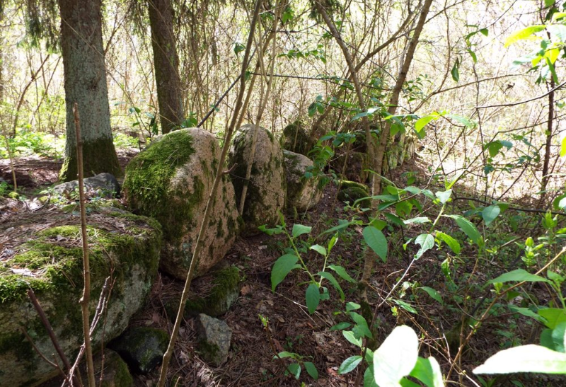 Paprūdžių kaimo senosios kapinės